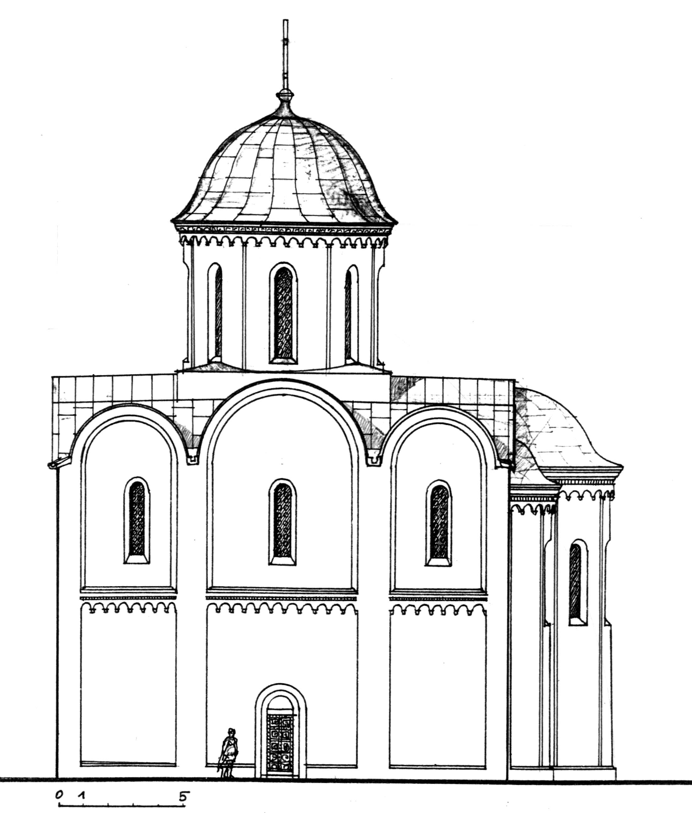 Реконструкція вигляду південного фасаду церкви Св.Івана на княжому дитинці города Перемишля